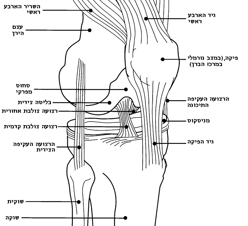 knee ברך